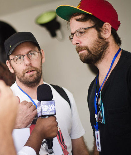 Dupla de grafiteiros Os Gemeos. Encontro reúne lideranças e artistas do HipHop paulista no Memorial da América Latina, em São Paulo.